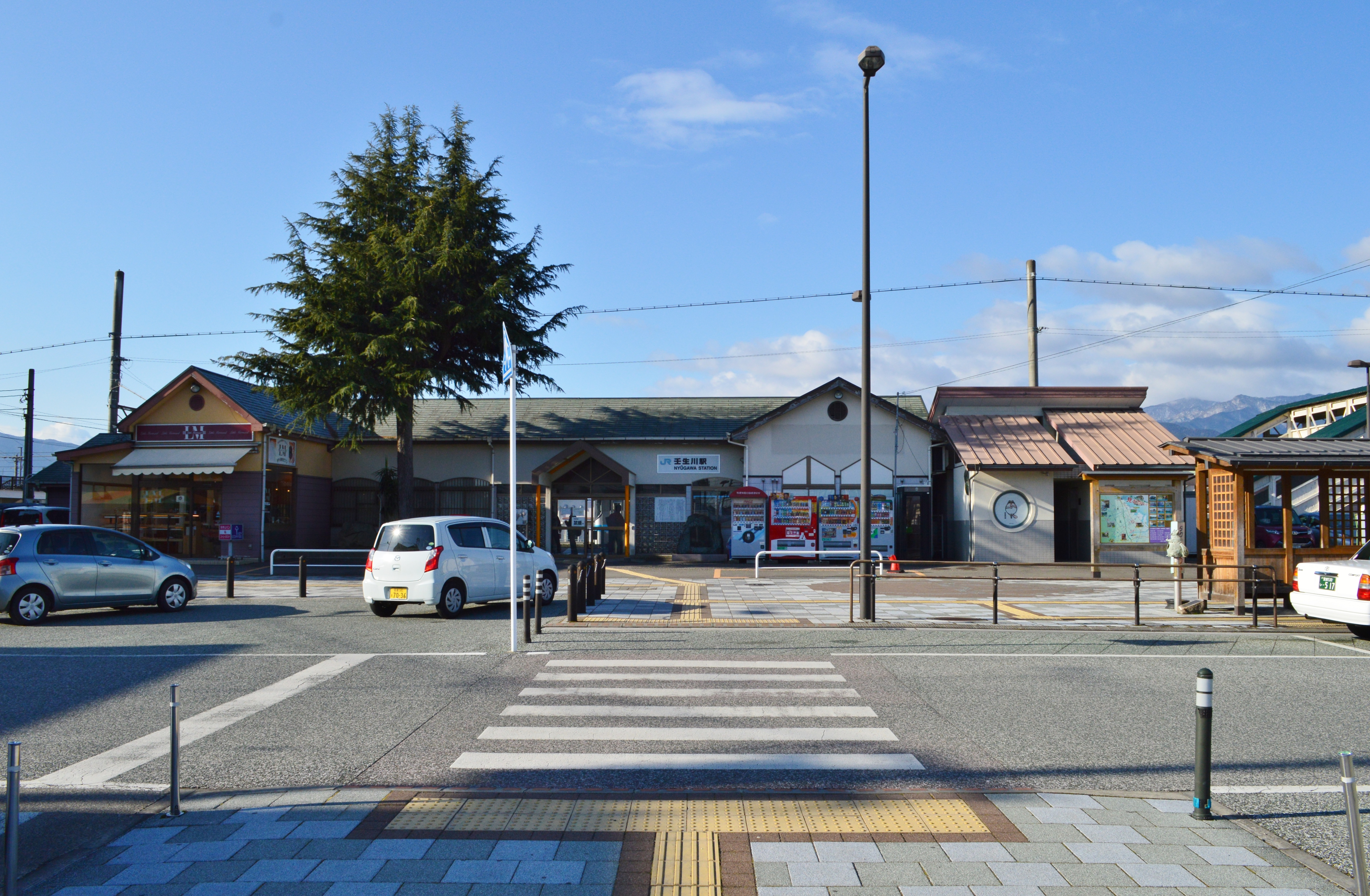 壬生川駅 駅舎